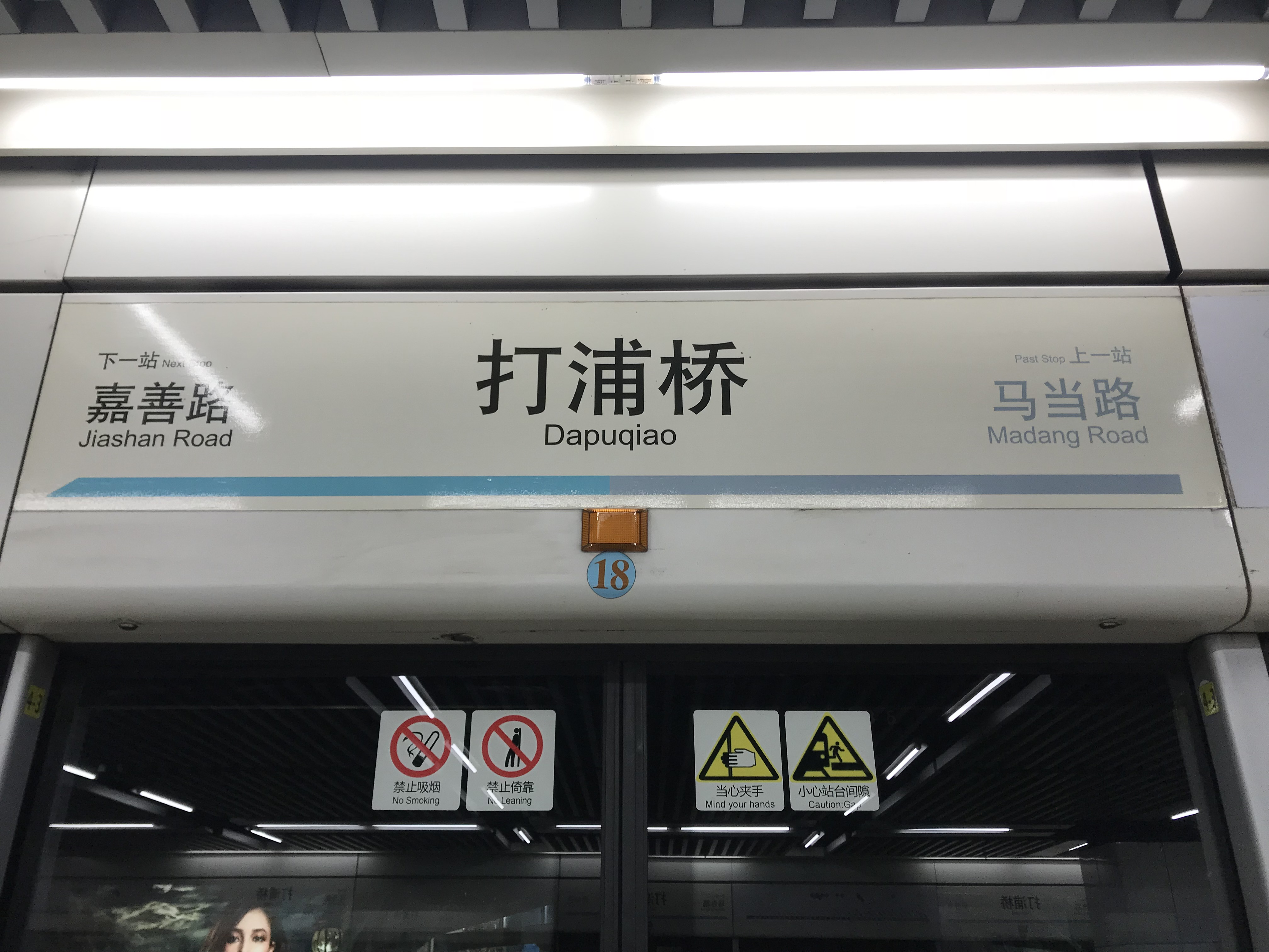 打浦橋駅の駅名標